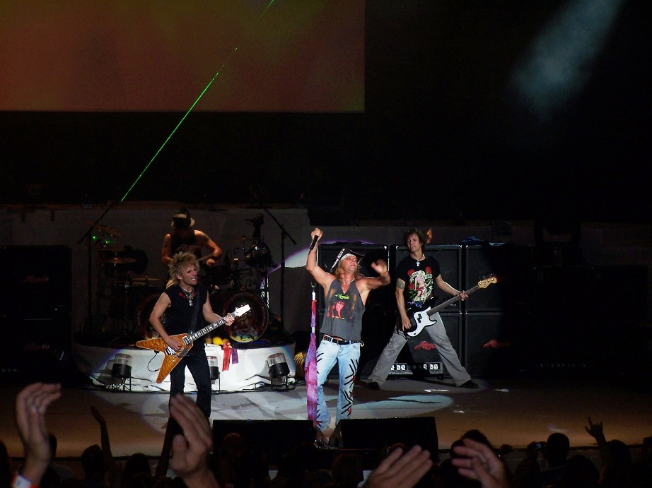 Poison image